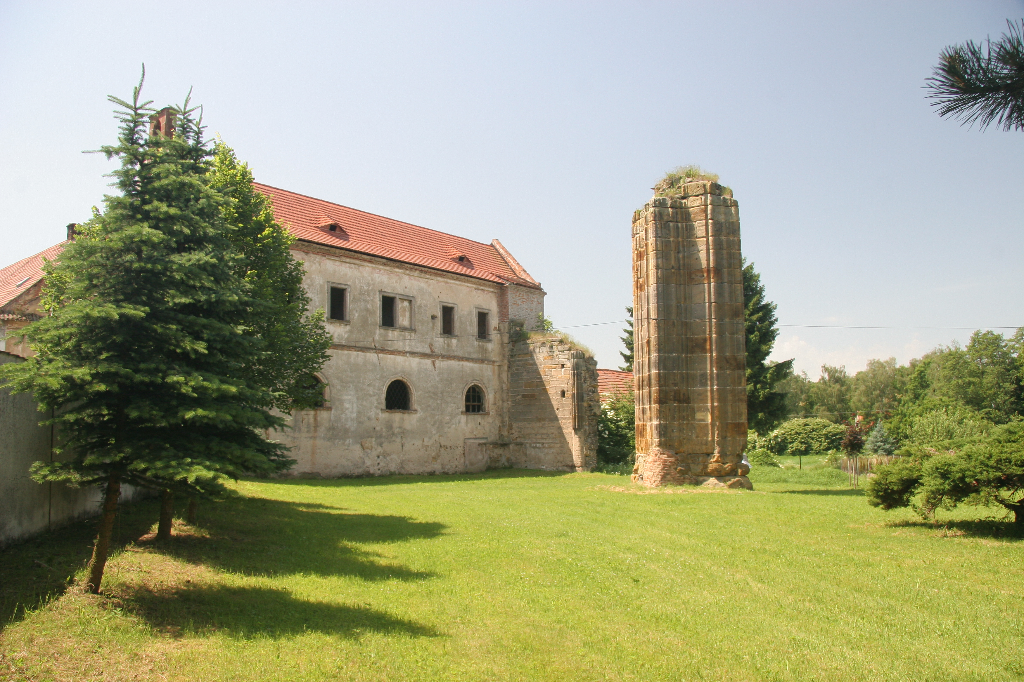 Klášter Klášterní Skalice